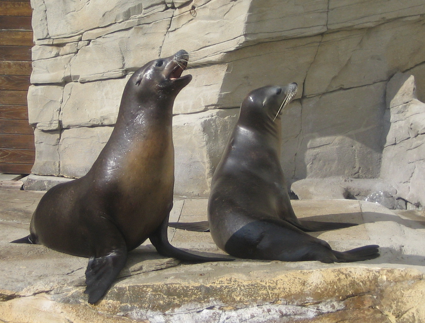 Otaries de Californie (zalophus californianus) à Nausicaá, Boulogne-sur-Mer.